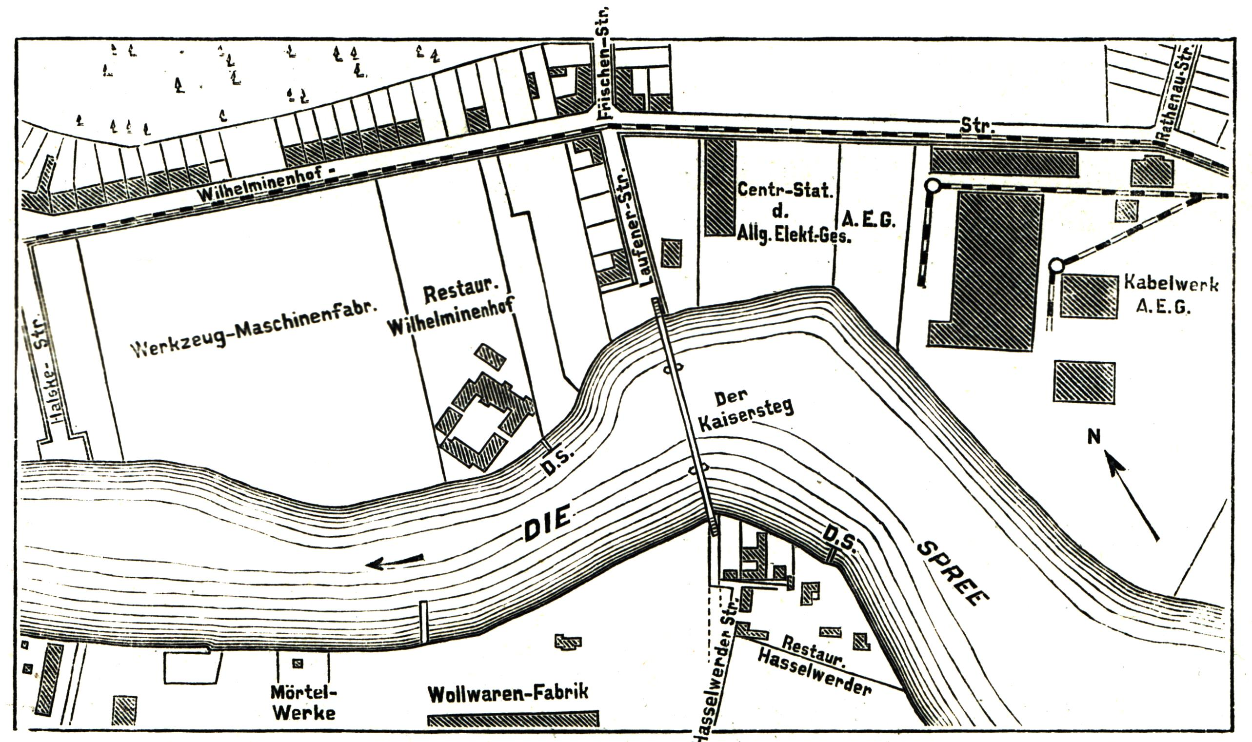 Berlin - Kaisersteg über die Spree, Oberschöneweide: Lagepan